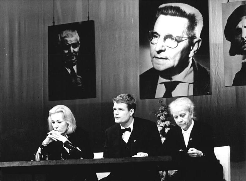 Zentralbild-Hochneder -7.10.1966 Berlin: Langhoff-Gedenkfeier im Deutschen Theater. Zu Ehren seines am 25. August verstorbenen Ehrenmitglieds, Prof. Wolfgang Langhoff, veranstaltet das Deutsche Theater am 7. Oktober anlässlich seines 65. Geburtstages eine Gedenkstunde, an der bedeutende Persönlichkeiten des gesellschaftlichen Lebens teilnahmen. Aus Briefen, Aufsätzen und Schriften lasen unter anderem die Schauspieler Inge Keller, Dieter Mann und Mathilde Danegger (v.l.n.r.).